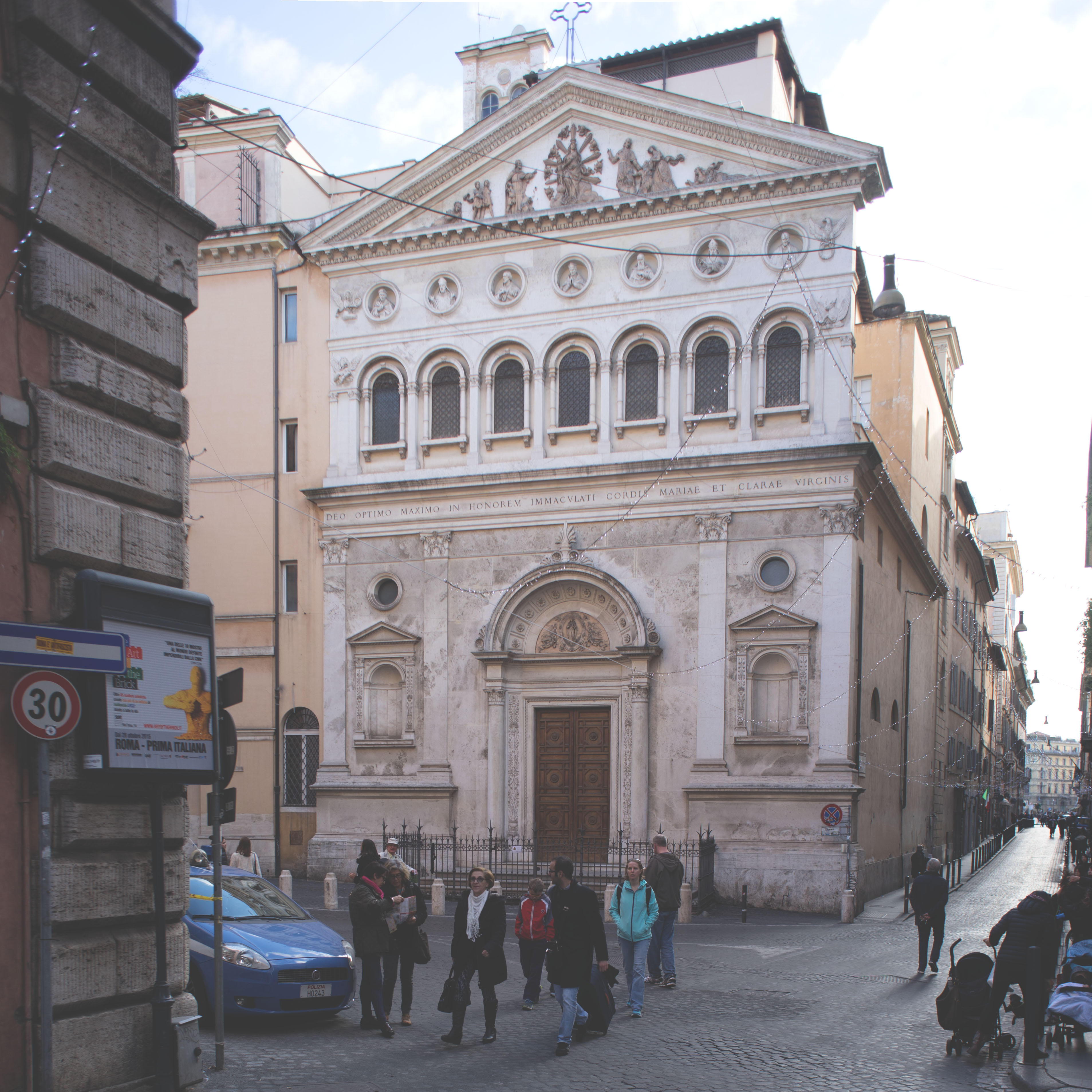 Facciata della Chiesa di Santa Chiara a Roma